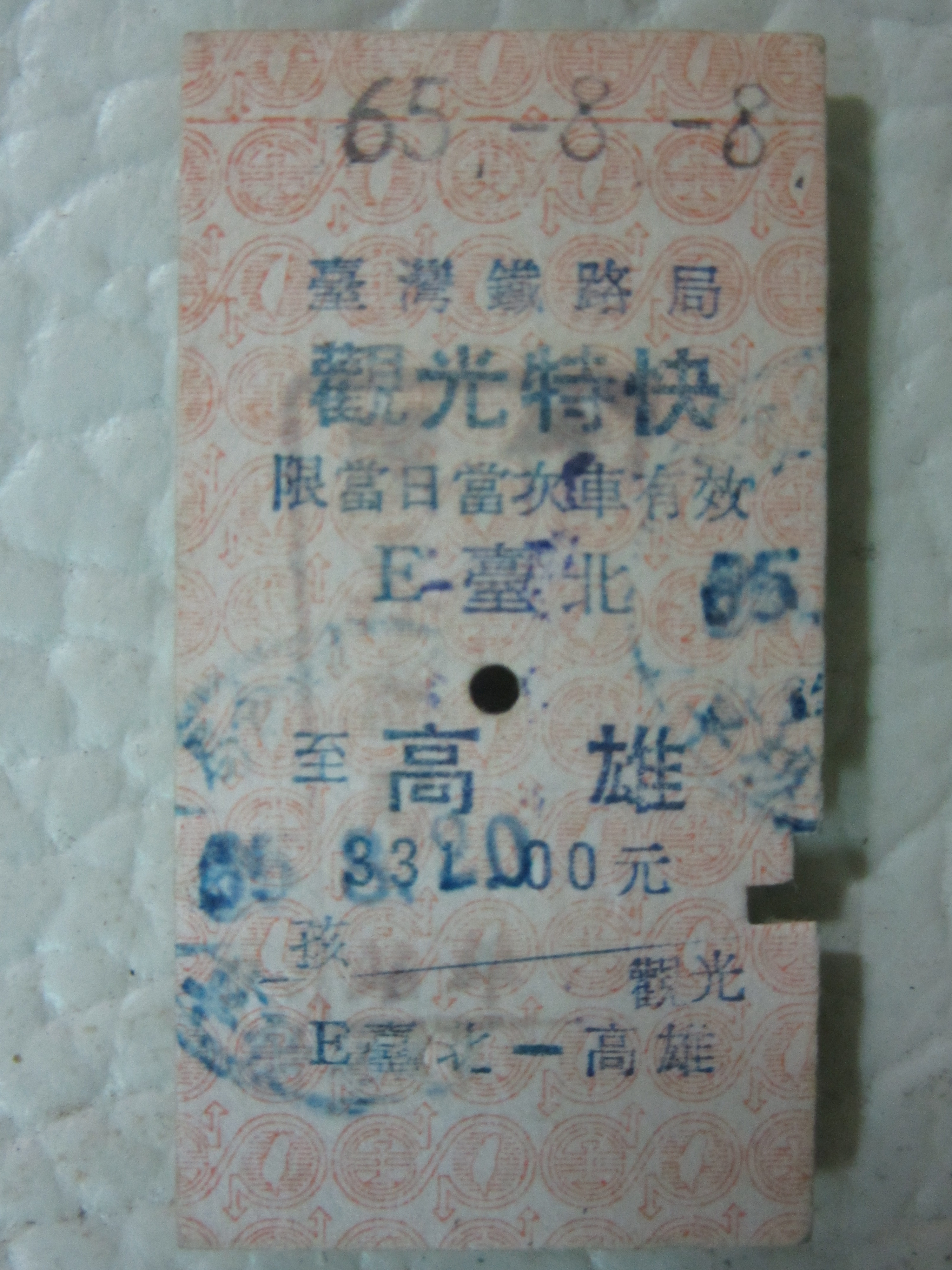 台鐵觀光特快名片式車票 台北往高雄